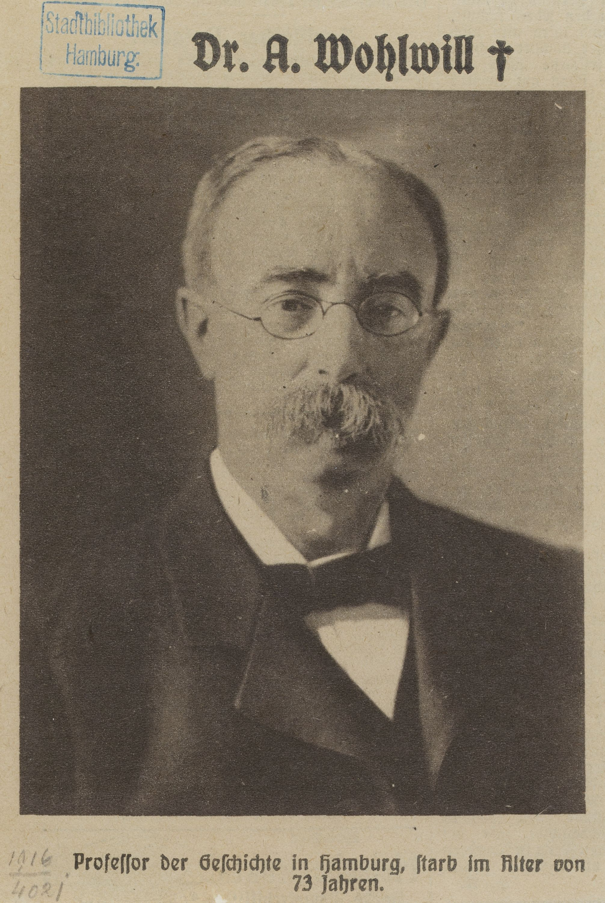 Bildnis von Adolf Benjamin Wohlwill